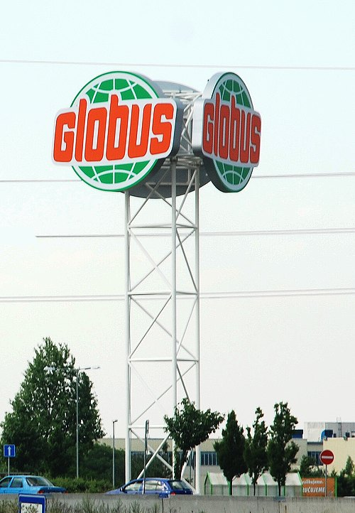 Logo společnosti Globus na stojanu v Praze na Zličíně